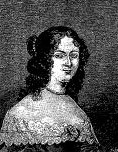 Madame de Staal-Delaunay